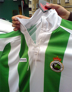 Camiseta del club de fútbol Racing de Santander.